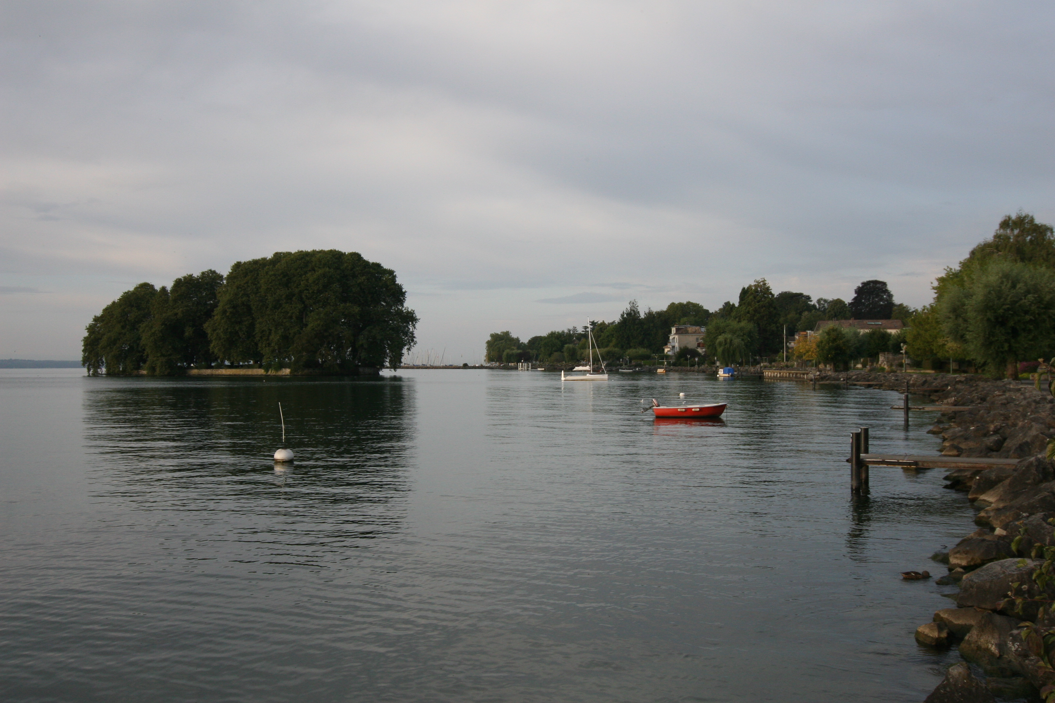 Ile de la Harpe im Genfer See, September 2010